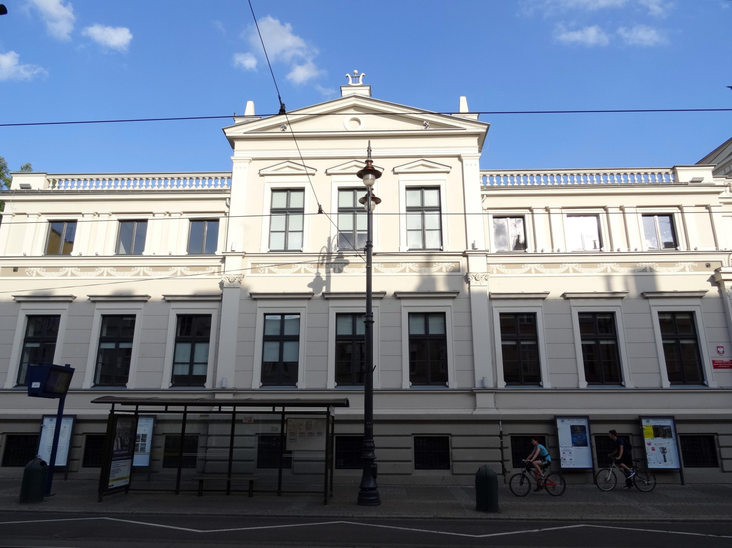 Dawne kasyno cywilne (1887), Pomorski Dom Sztuki, od 2006 r. w gestii Akademii Muzycznej w Bydgoszczy, ul. Gdańska 20